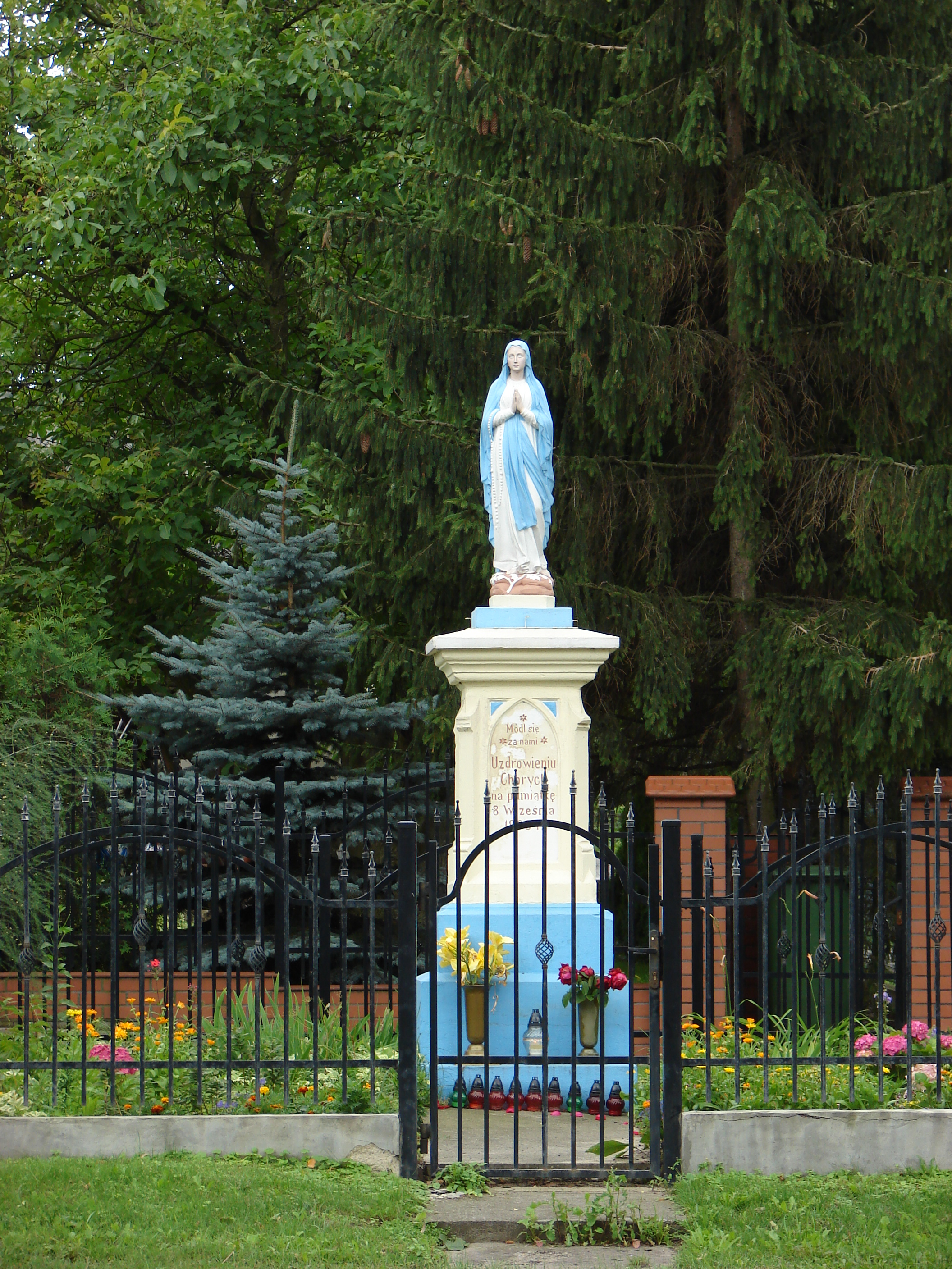 Przydrożna figurka w Głogowie, Gmina Obrowo z 1908.